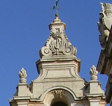 מגדל זה פעמונים